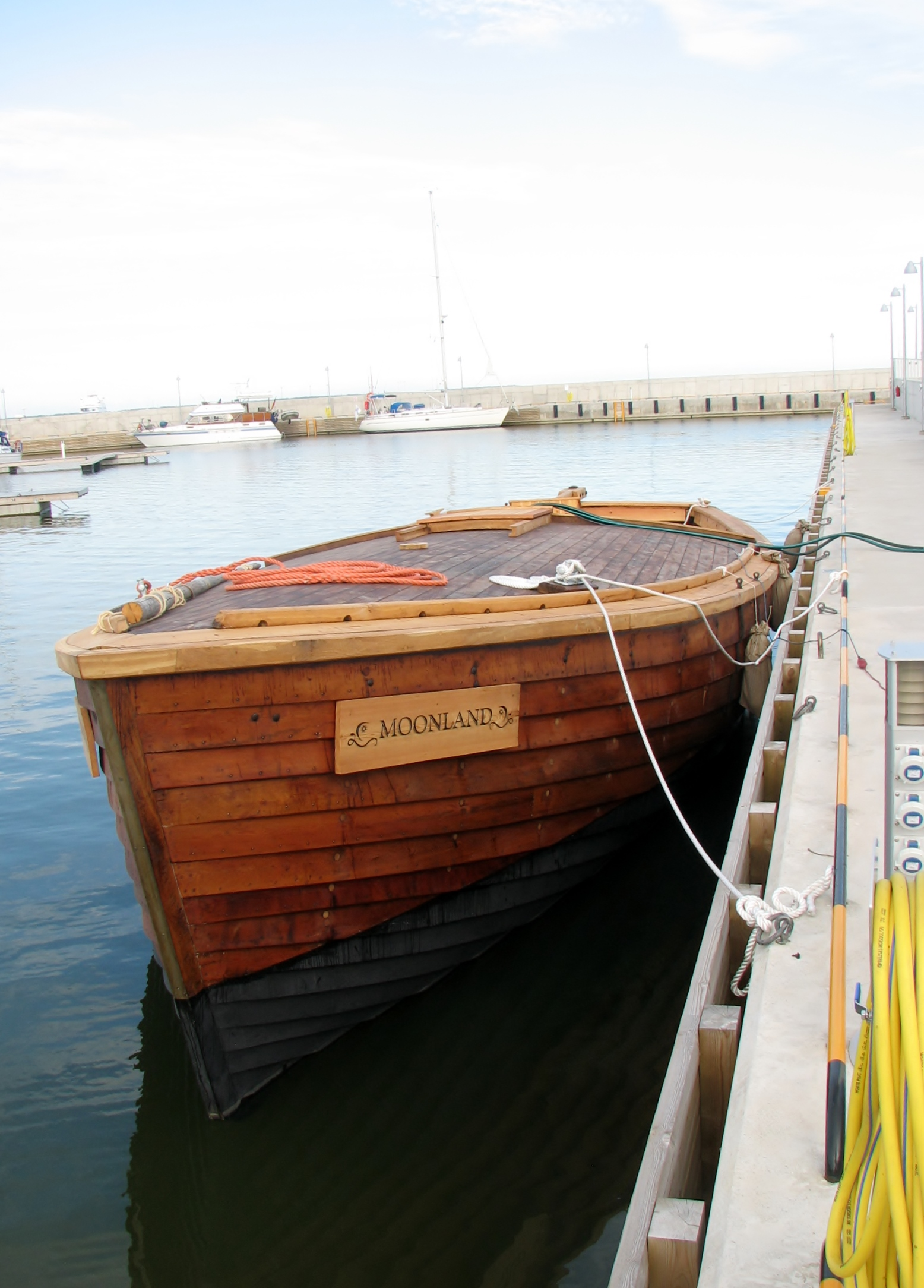 Moonland Kuivastu sadamas (esiosa)